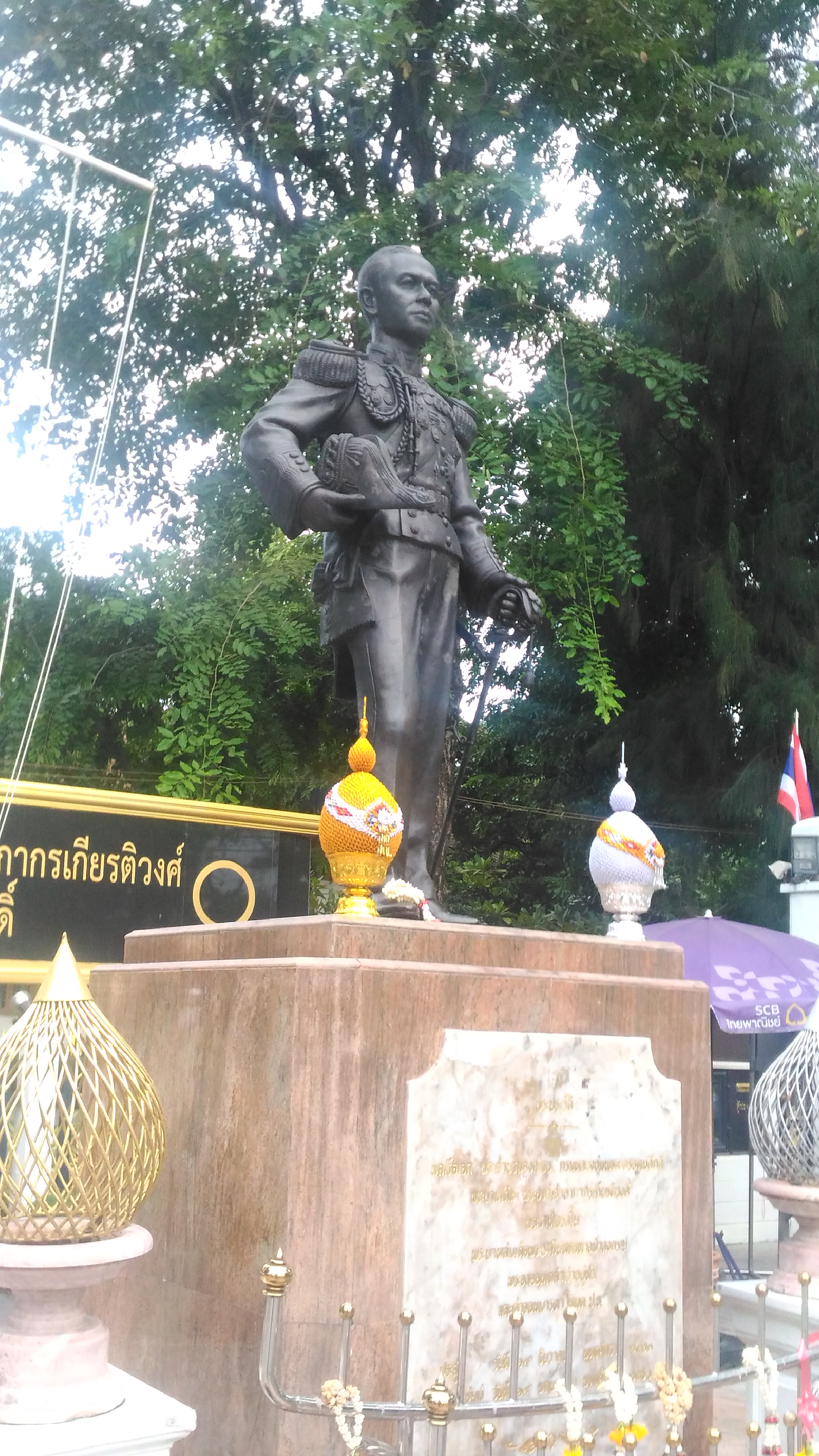 พระอนุสาวรีย์นายพลเรือเอก พระเจ้าบรมวงศ์เธอ พระองค์เจ้าอาภากรเกียรติวงศ์ กรมหลวงชุมพรเขตอุดมศักดิ์ ณ มหาวิทยาลัยเทคโนโลยีราชมงคลพระนคร ศูนย์พณิชยการพระนคร (วังนางเลิ้งเดิม) ถนนพิษณุโลก เขตดุสิต กรุงเทพมหานคา